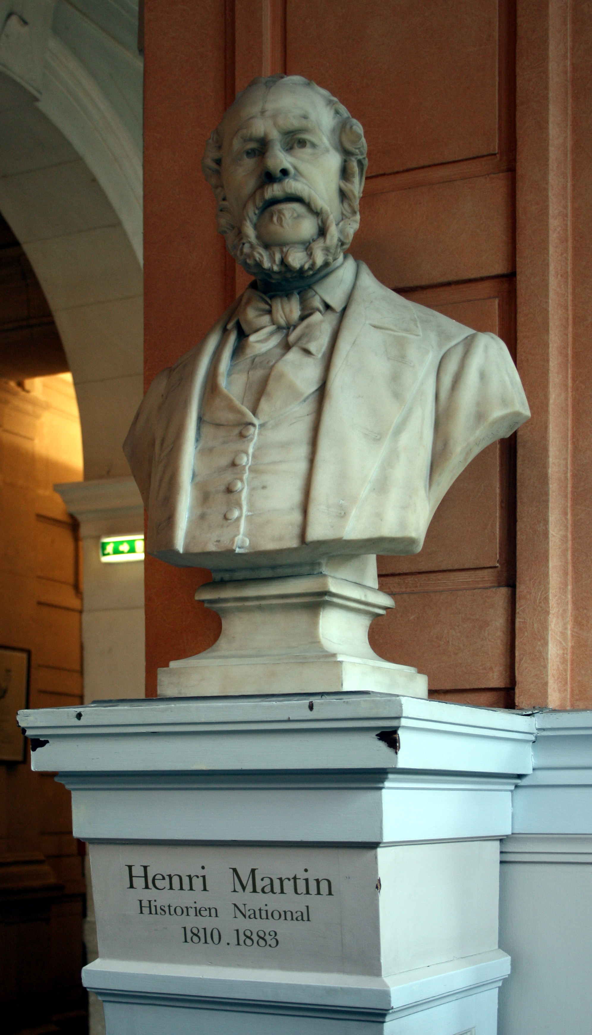 Buste d'Henri Martin à la mairie du XVIème arrondissement à Paris